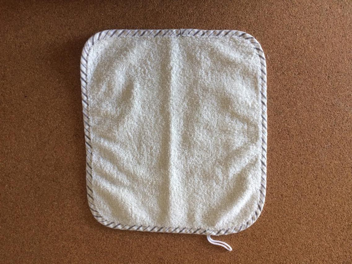 Λαβέτα μονή τετράγωνη